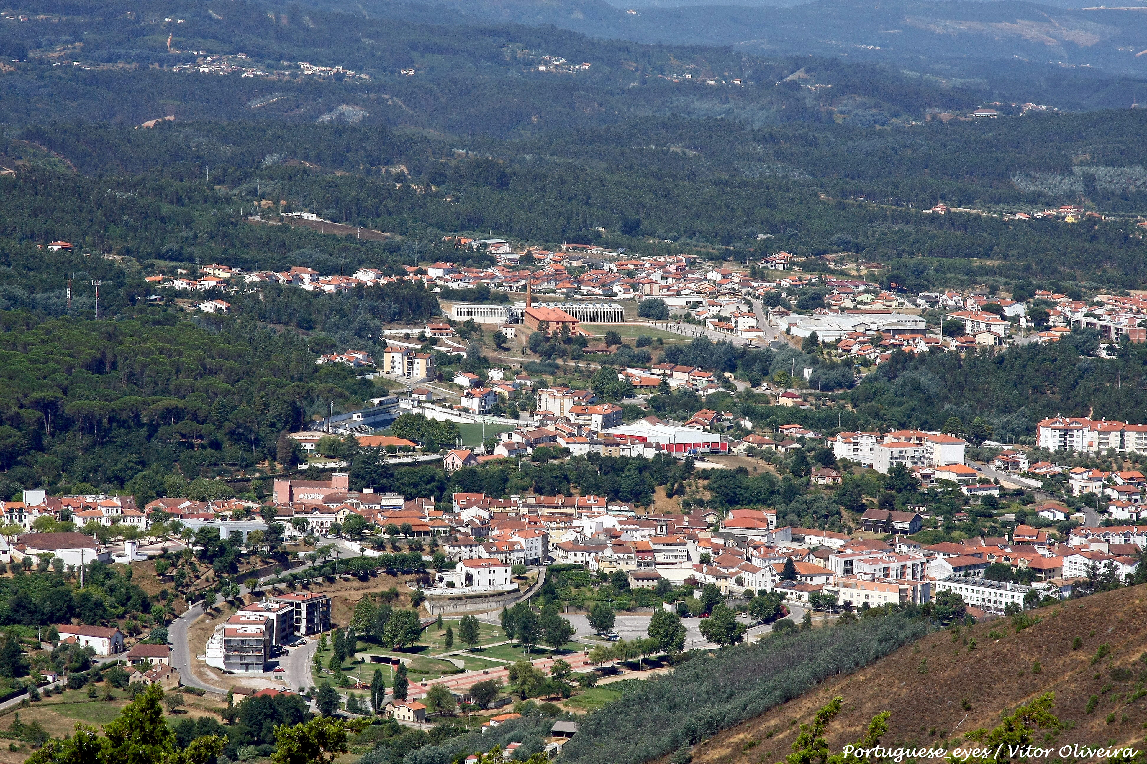 Arganil - Portugal